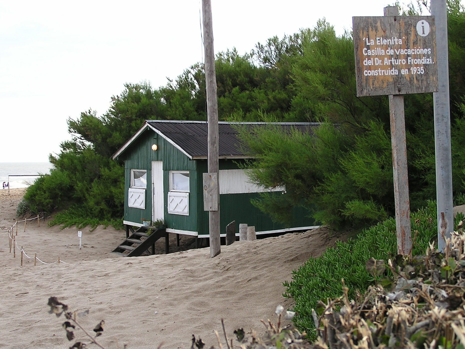 Perteneciente al ex Presidente Arturo Frondizi